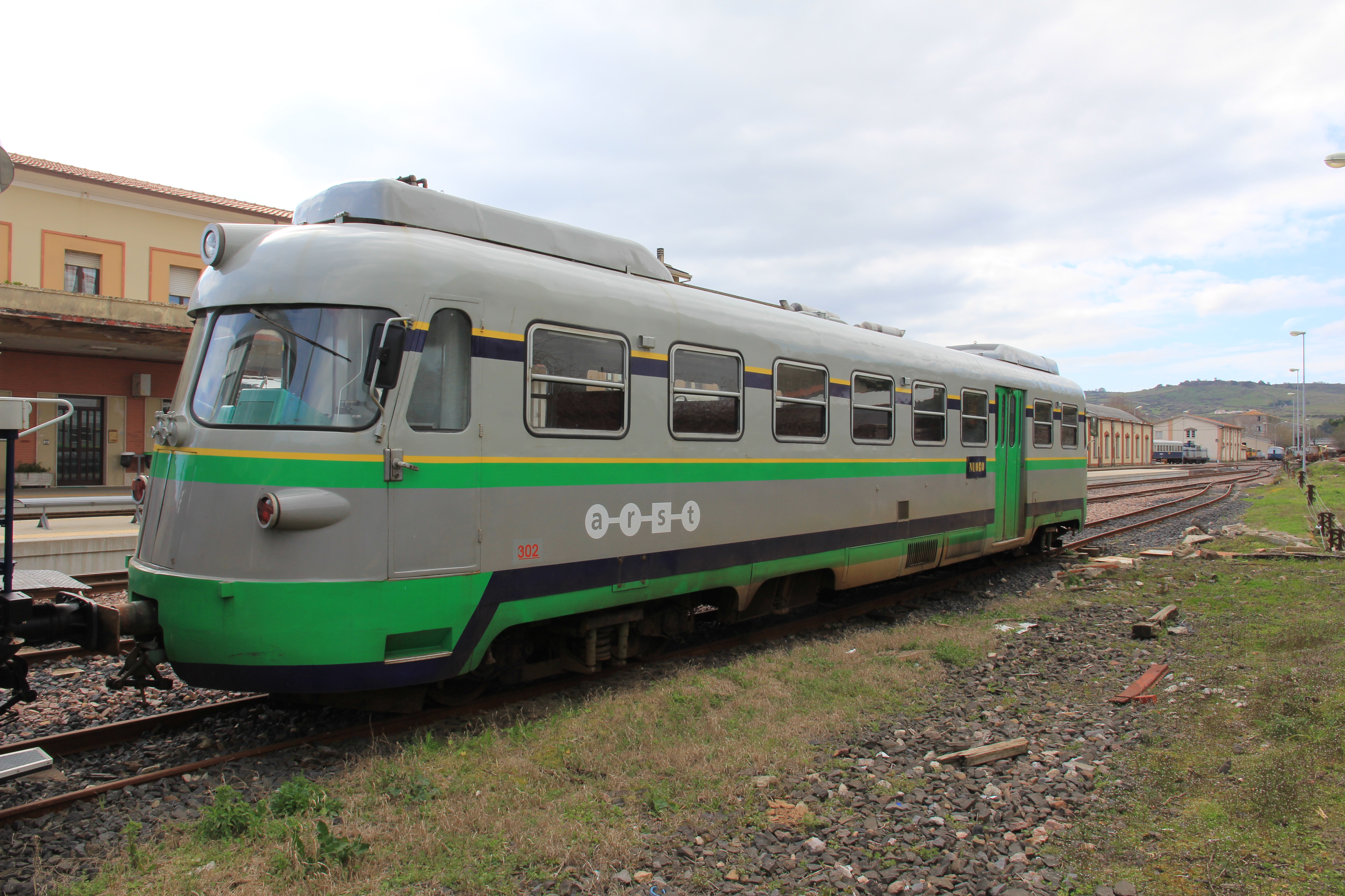 Macomer - Stazione ferroviaria ARST